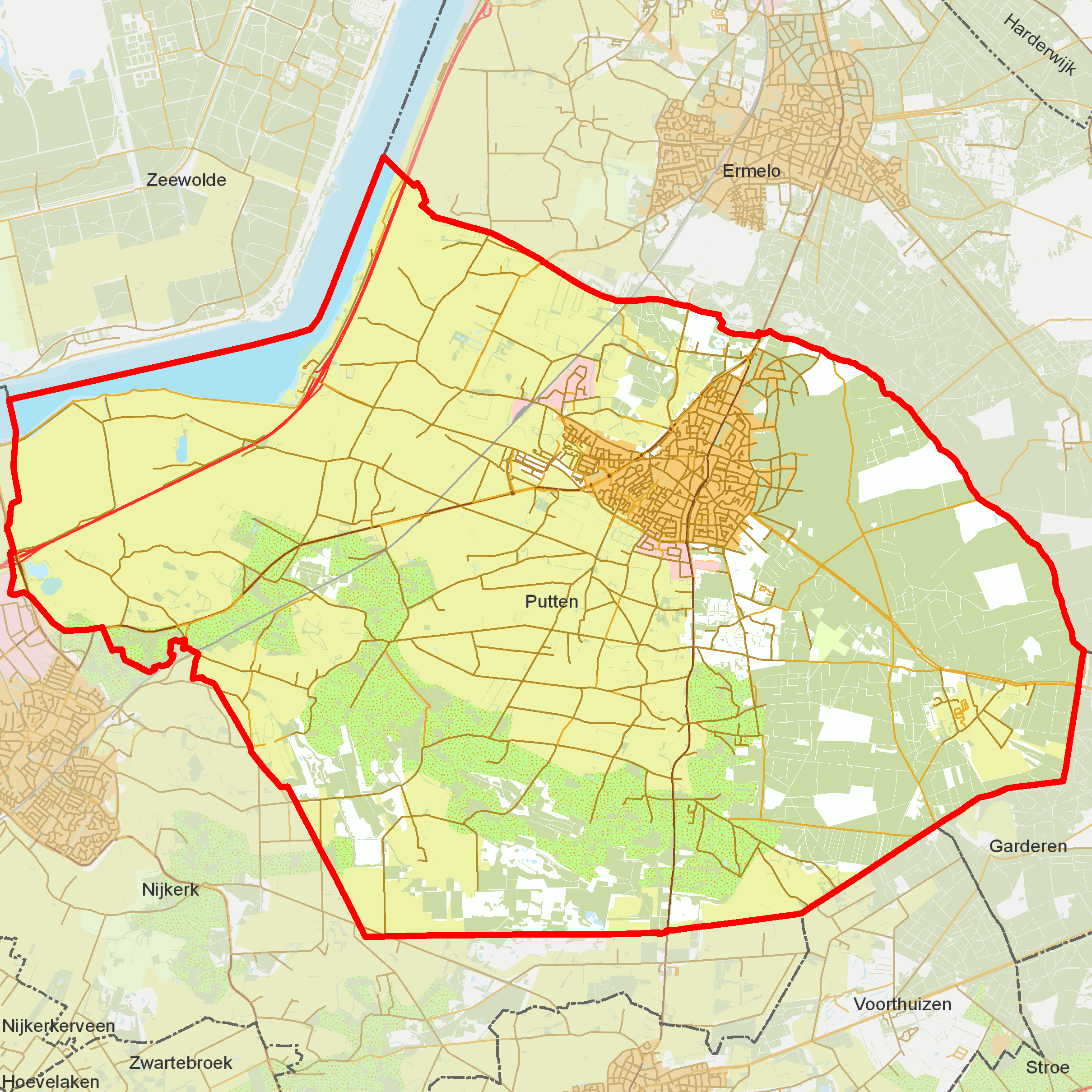 BAG woonplaatsen - Gemeente Putten.png